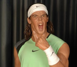 Museo de Cera de Madrid ; Rafael Nadal